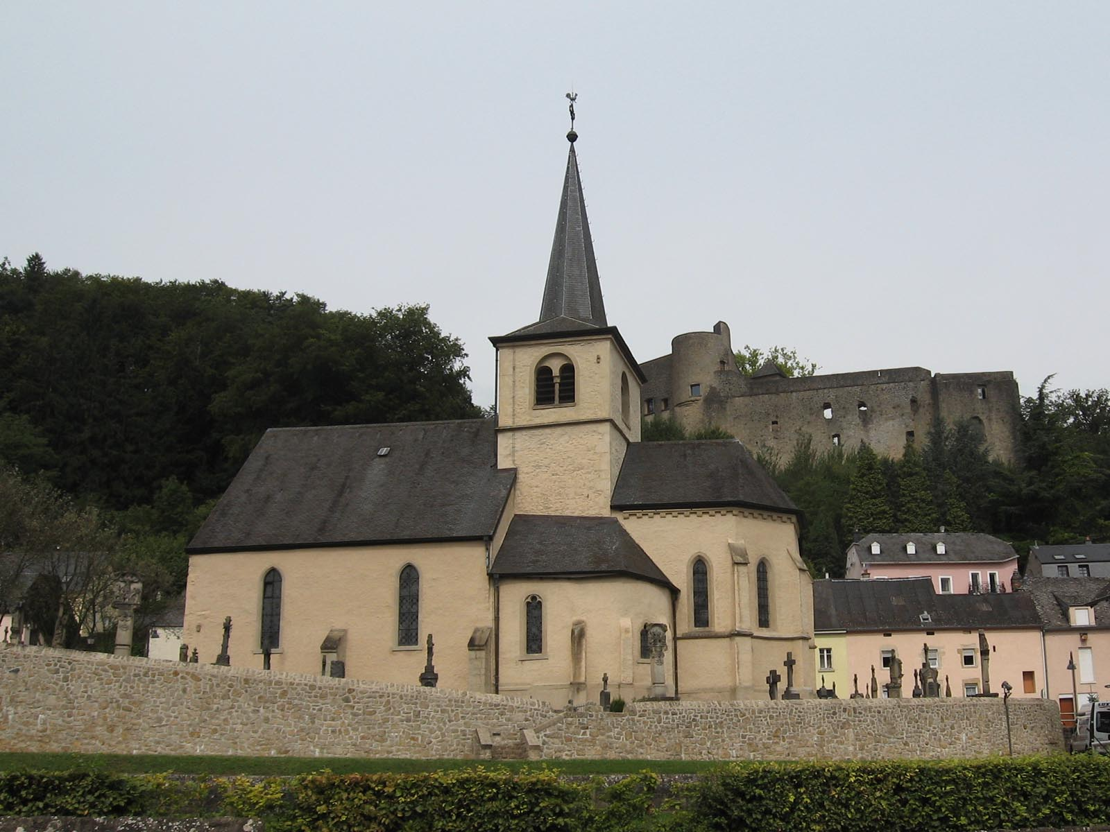 Septfontaines kerk (Luxemburg)